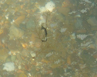 juvenil en su balsa